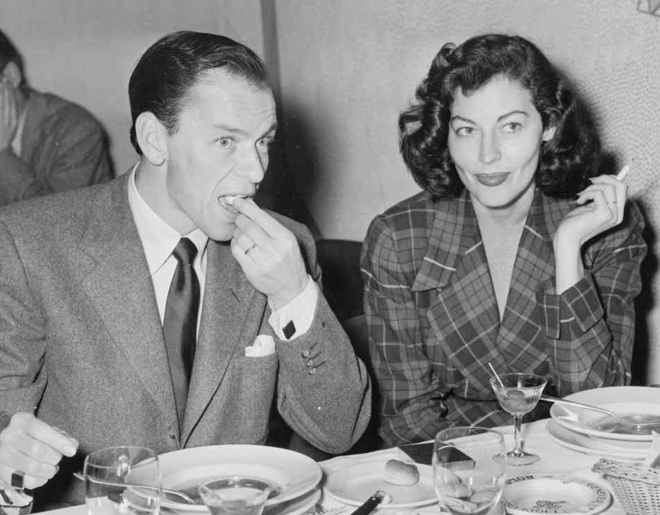 Frank Sinatra en Ava Gardner aan tafel in het restaurant van Schiphol, 13 december 1951 Foto Ben van Meerendonk / AHF, collectie IISG, Amsterdam Foto gepubliceerd in Het Vrije Volk, 14 december 1951, pagina 9, waarbij de man achter Sinatra is weggeretoucheerd.